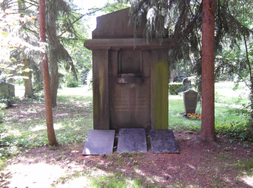 Grabstätte der Familien Löwenheim - Steinert